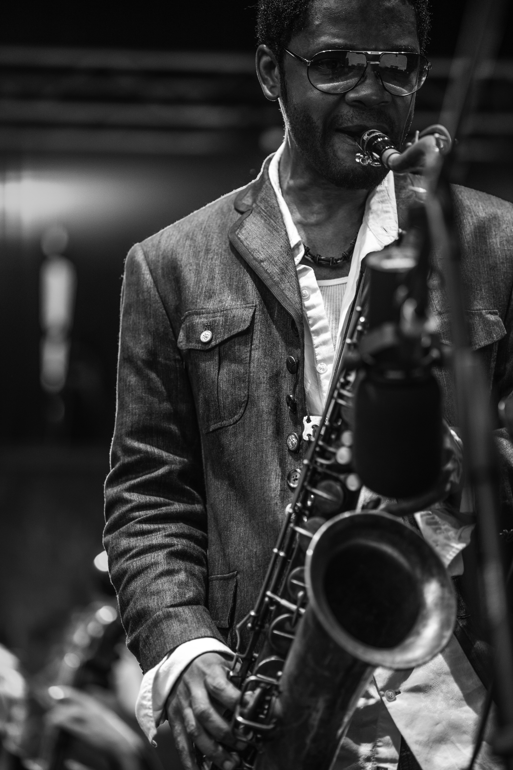 Mark Shim 19º FESTIVAL INTERNACIONAL DE JAZZ DE PUNTA DEL ESTE FINCA EL SOSIEGO, Maldonado, Uruguay